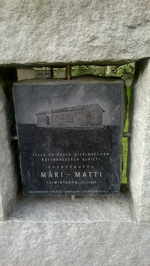 Jyväskylässä vuosina 1916-1983 toimineen E-osuusliikkeen (Mäki-Matti) muistokivi Voionmaankadun varressa